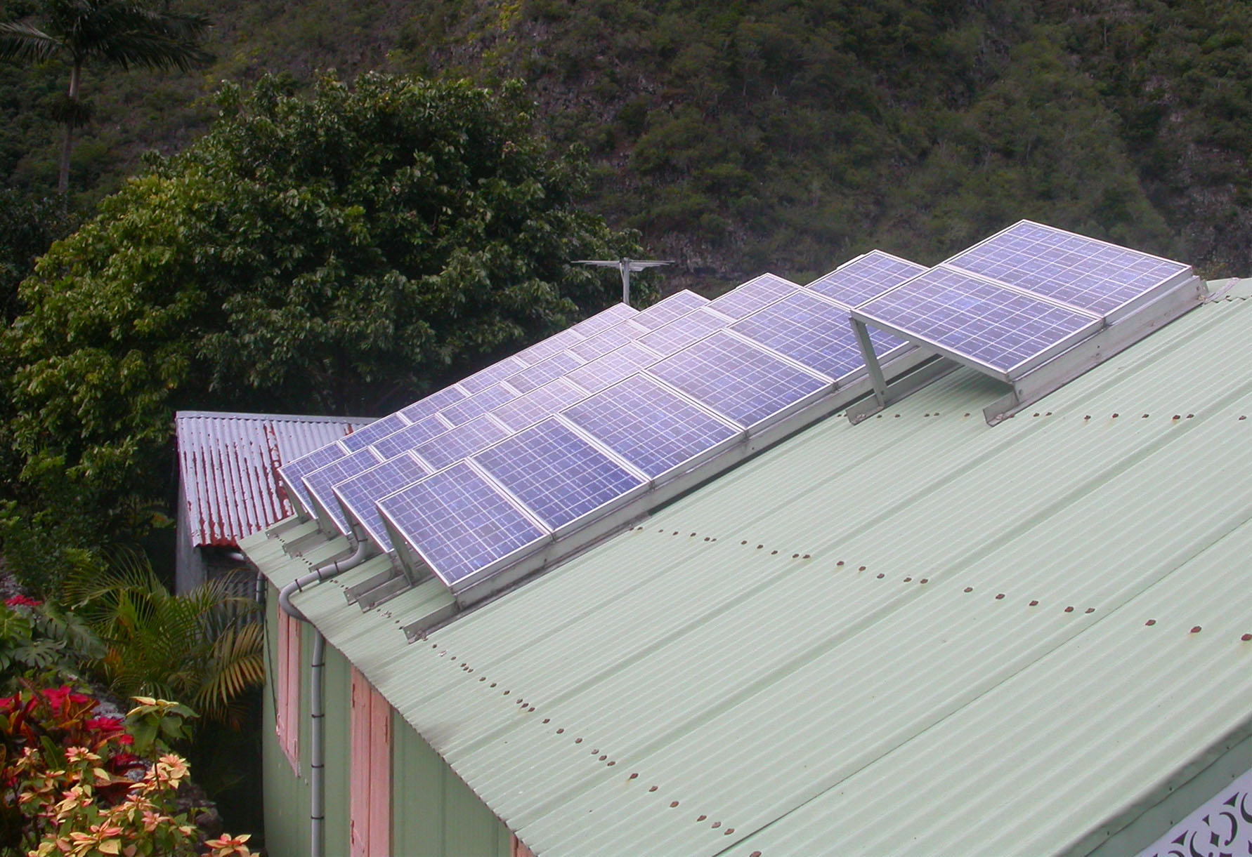 Modules solaires équipant les toits d'un village isolé de l'île de la Réunion (Grand Bassin).